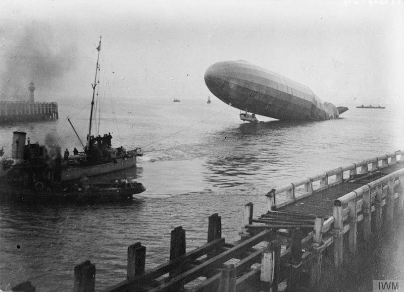 L 12 på slæb efter torpedobåd T 13 ankommer til Oostende 10. aug. 1915